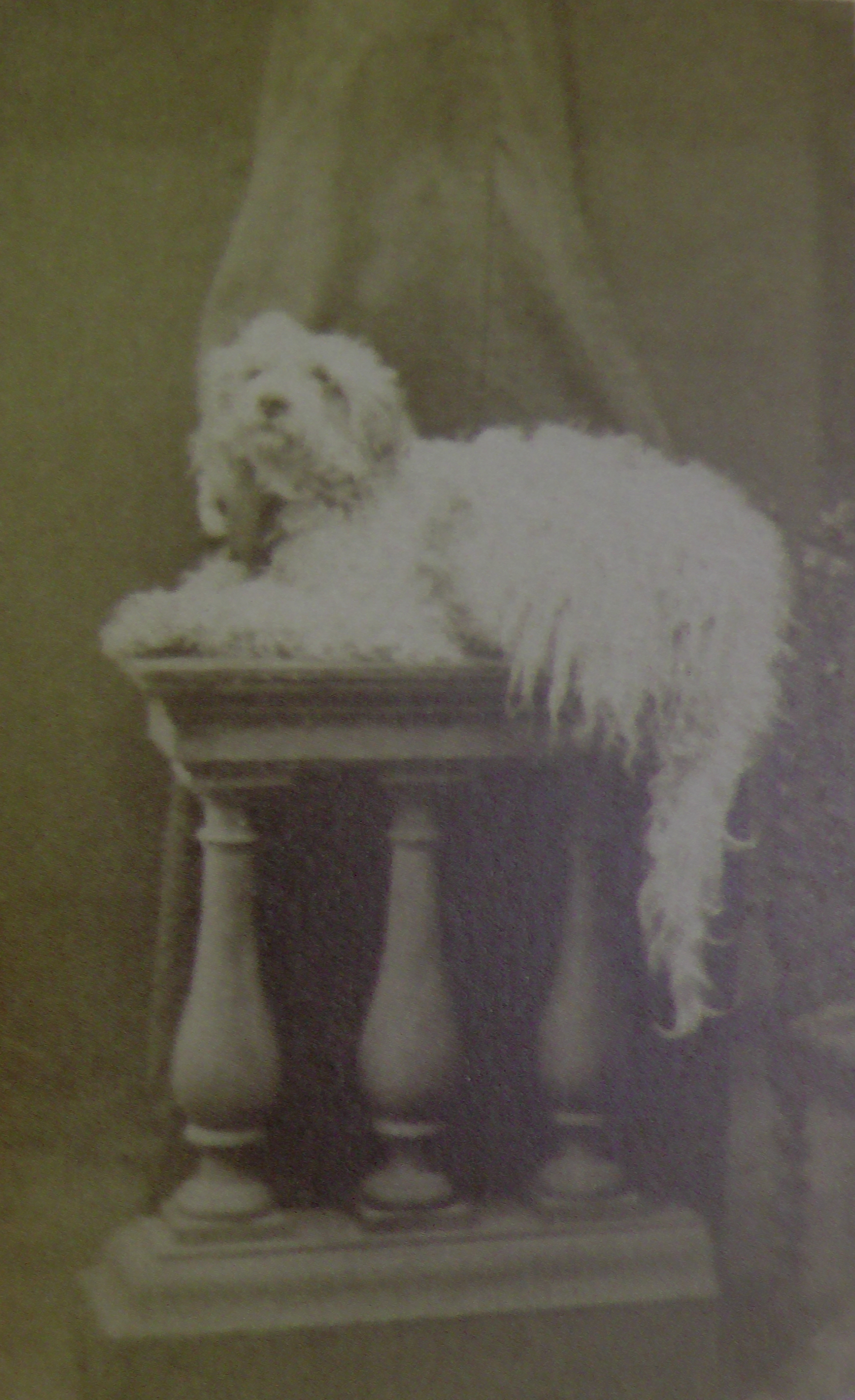 Коллекция Linda Fregni Nagler. №0722, 10х6 см